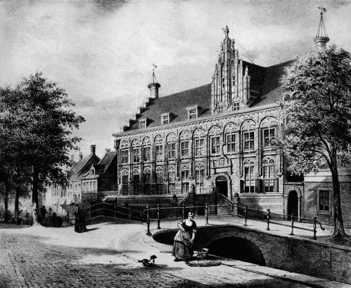 De Kanselarij of het vroegere Geregtshof te Leeuwarden